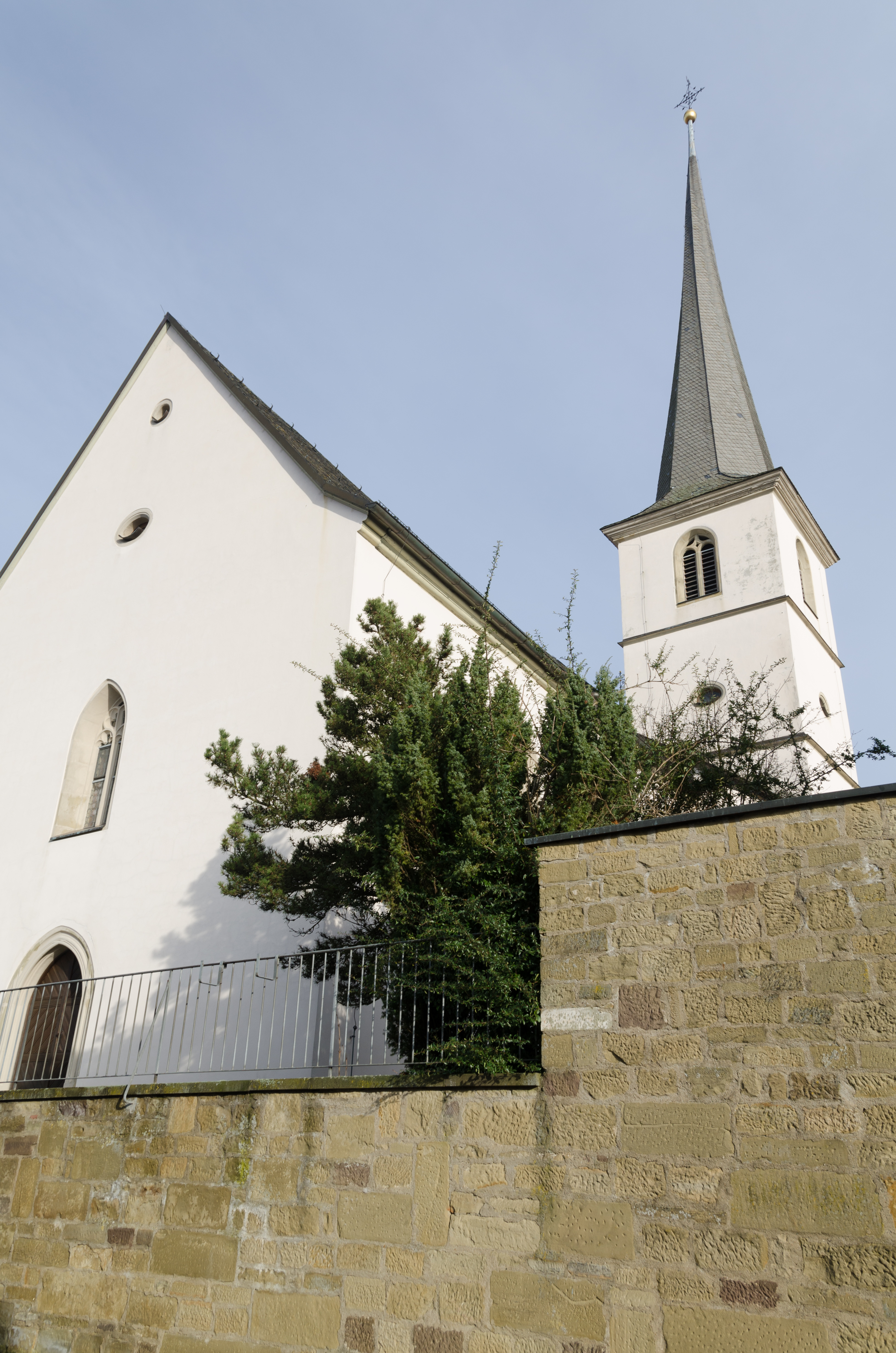 Poppenhausen, Maibach, Kath. Pfarrkirche St. Kilian